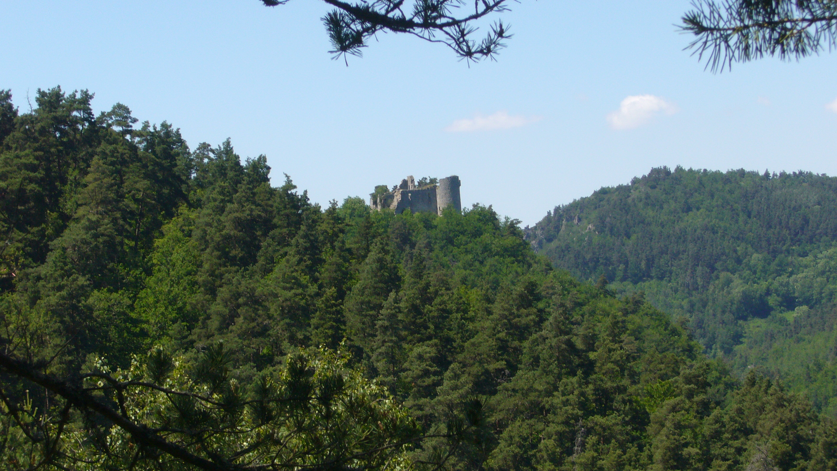 Le château de la Garde, commune d'Albaret-Sainte-Marie, Lozère, France